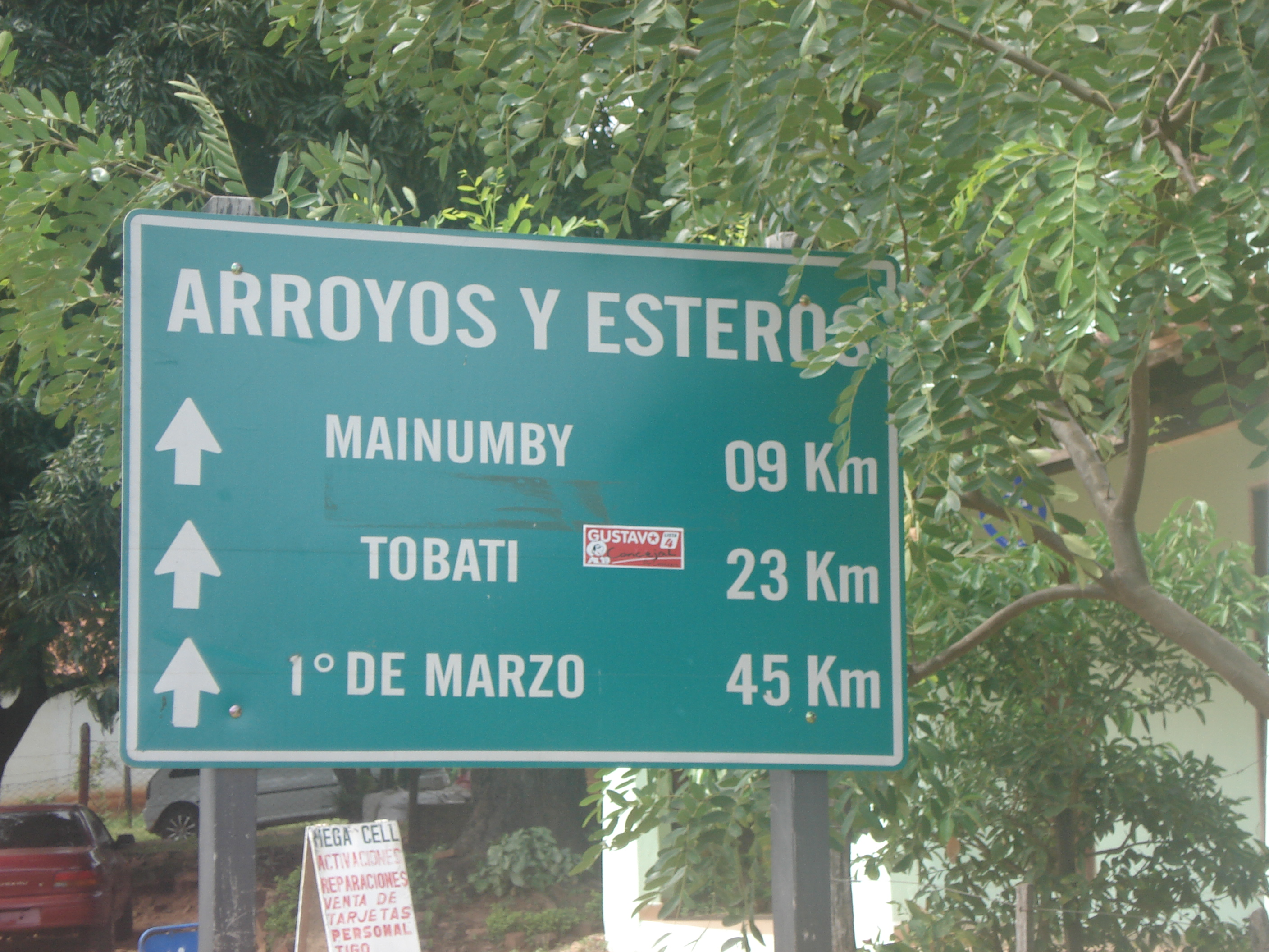 cartel